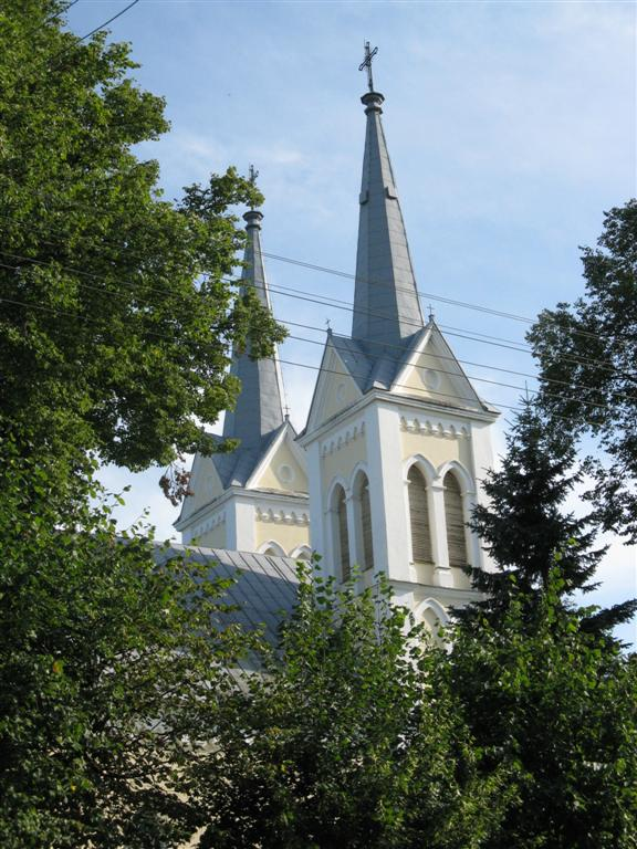 Obelių Šv. Onos bažnyčia